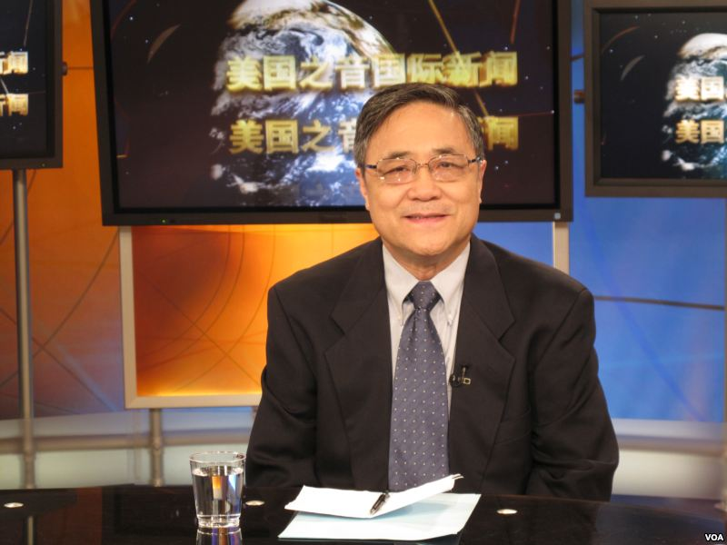 Gao Wenqian.jpg